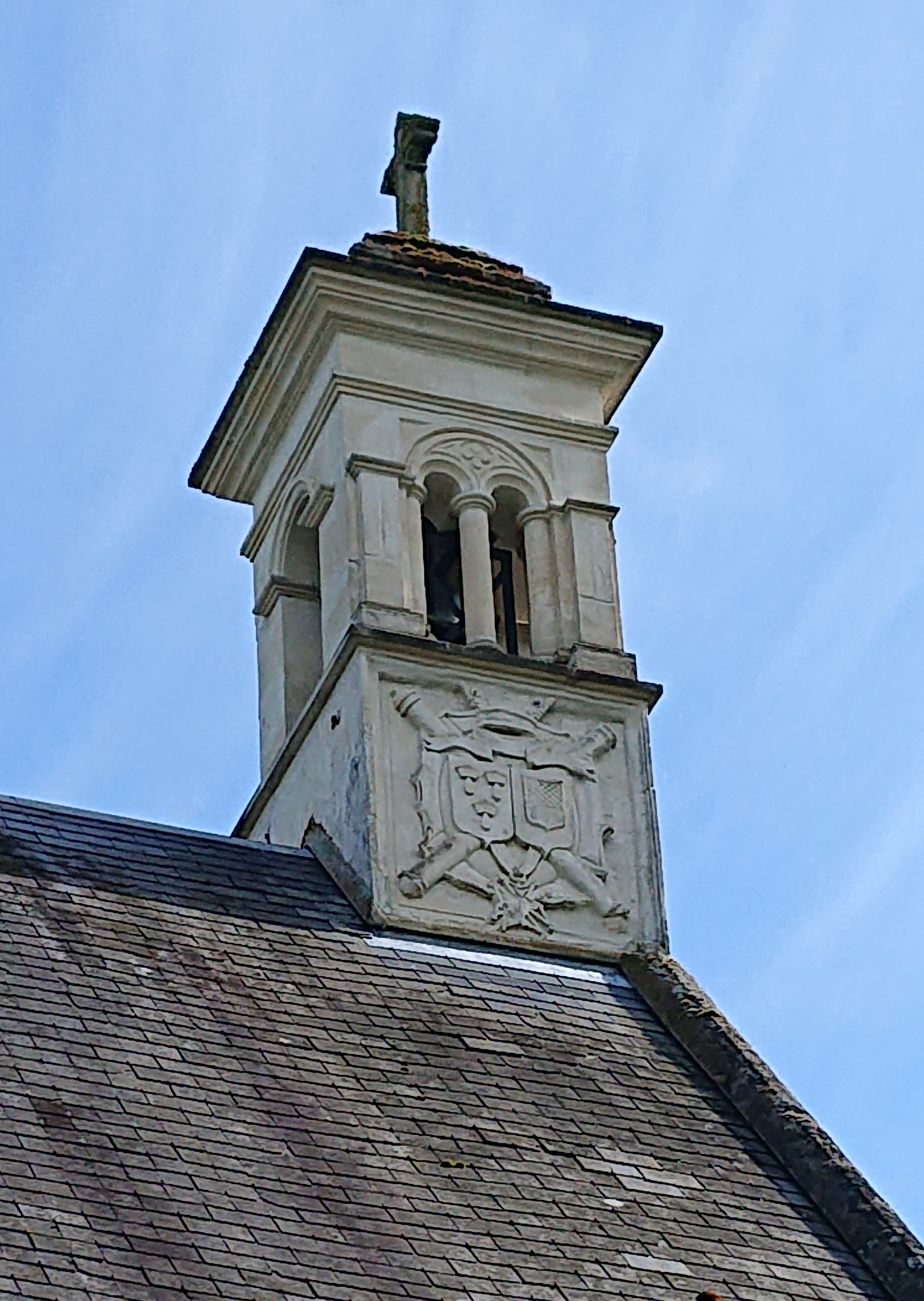 Chapelle Notre-Dame de la Faigne - Campanile de faîtage